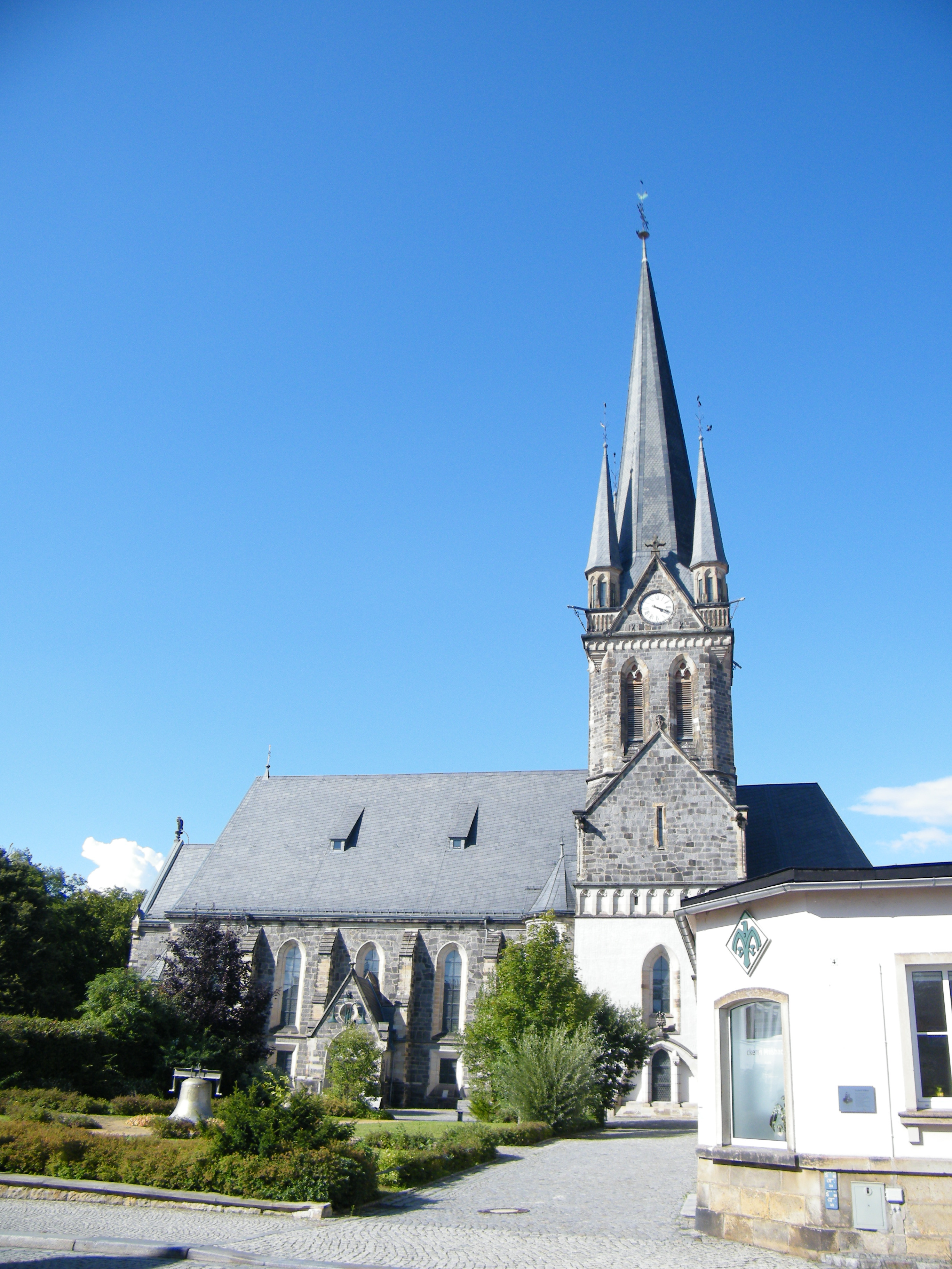 St. Jakobi Kirche, Neustadt in Sachsen